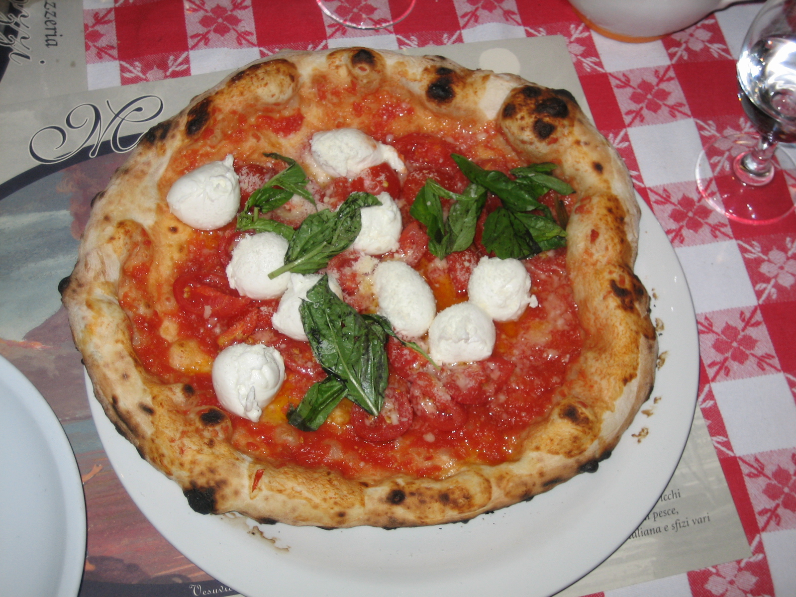 Traditional Neapolitan pizza.